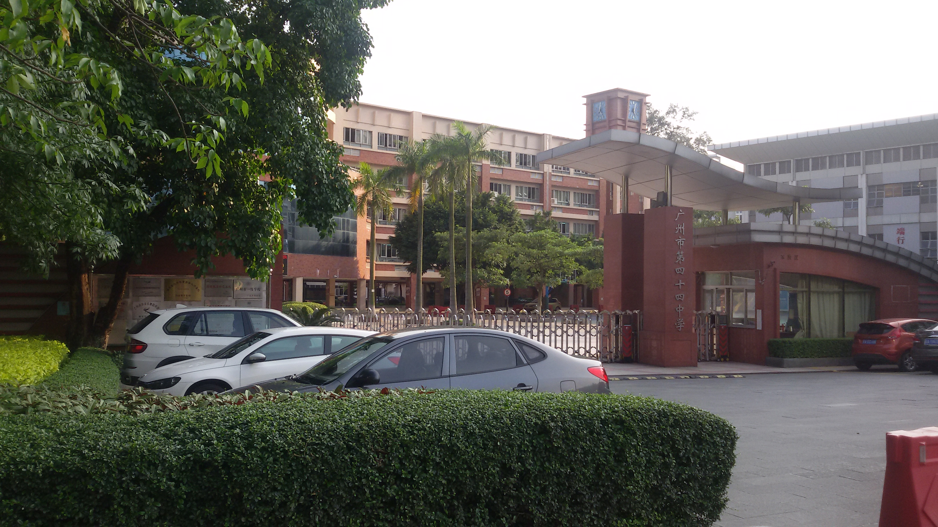 粵語: 廣州市第卌四中學嘅高中部